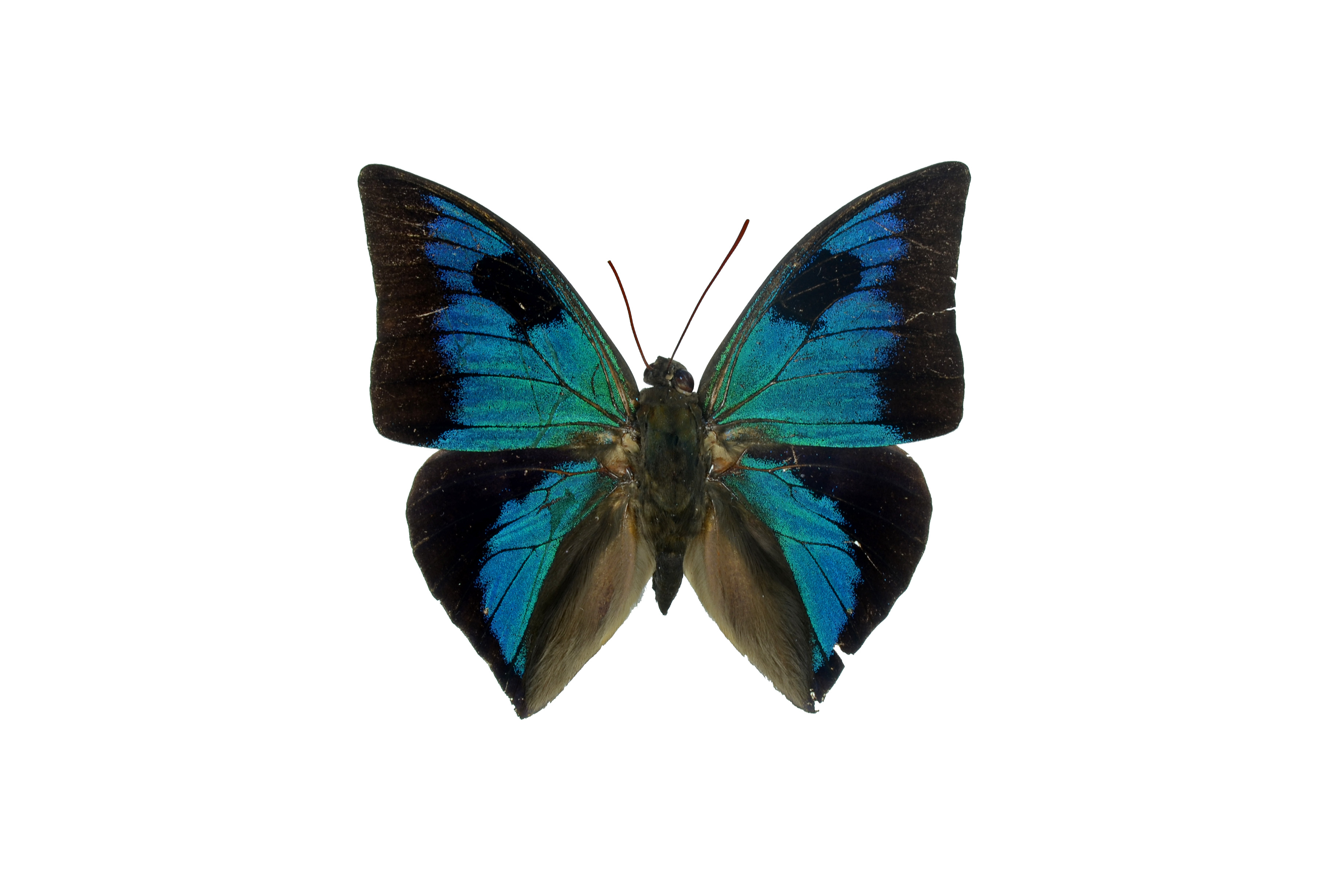 eastern Ecuador